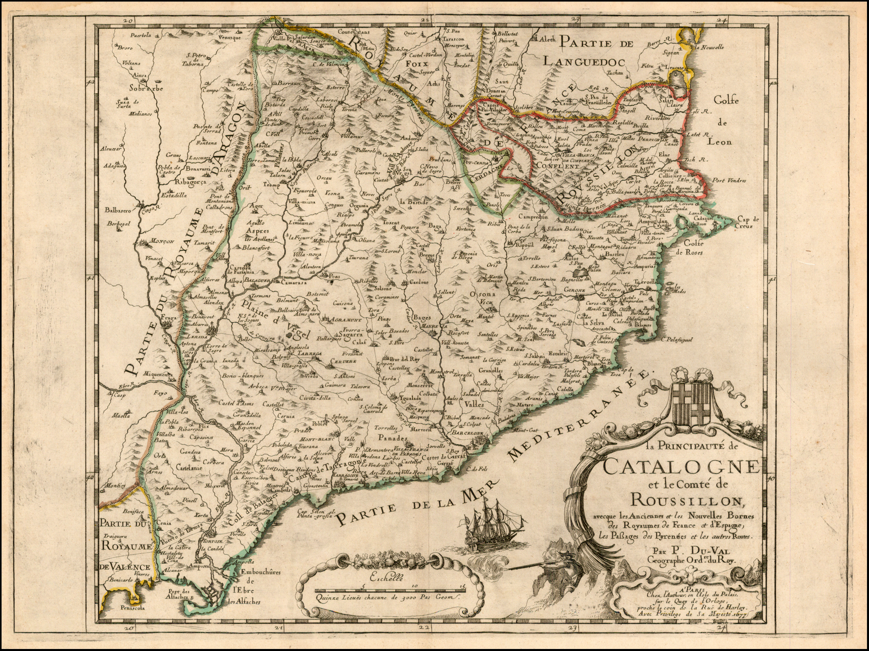 Principado de Cataluña y Condado de Rosellón. Mapa de Pierre du Val, París, 1677.